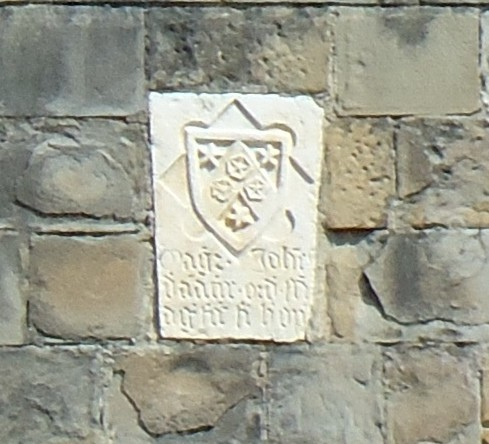 particolare della facciata della chiesa, con scritto il nome "Giovanni", monaco agostiniano